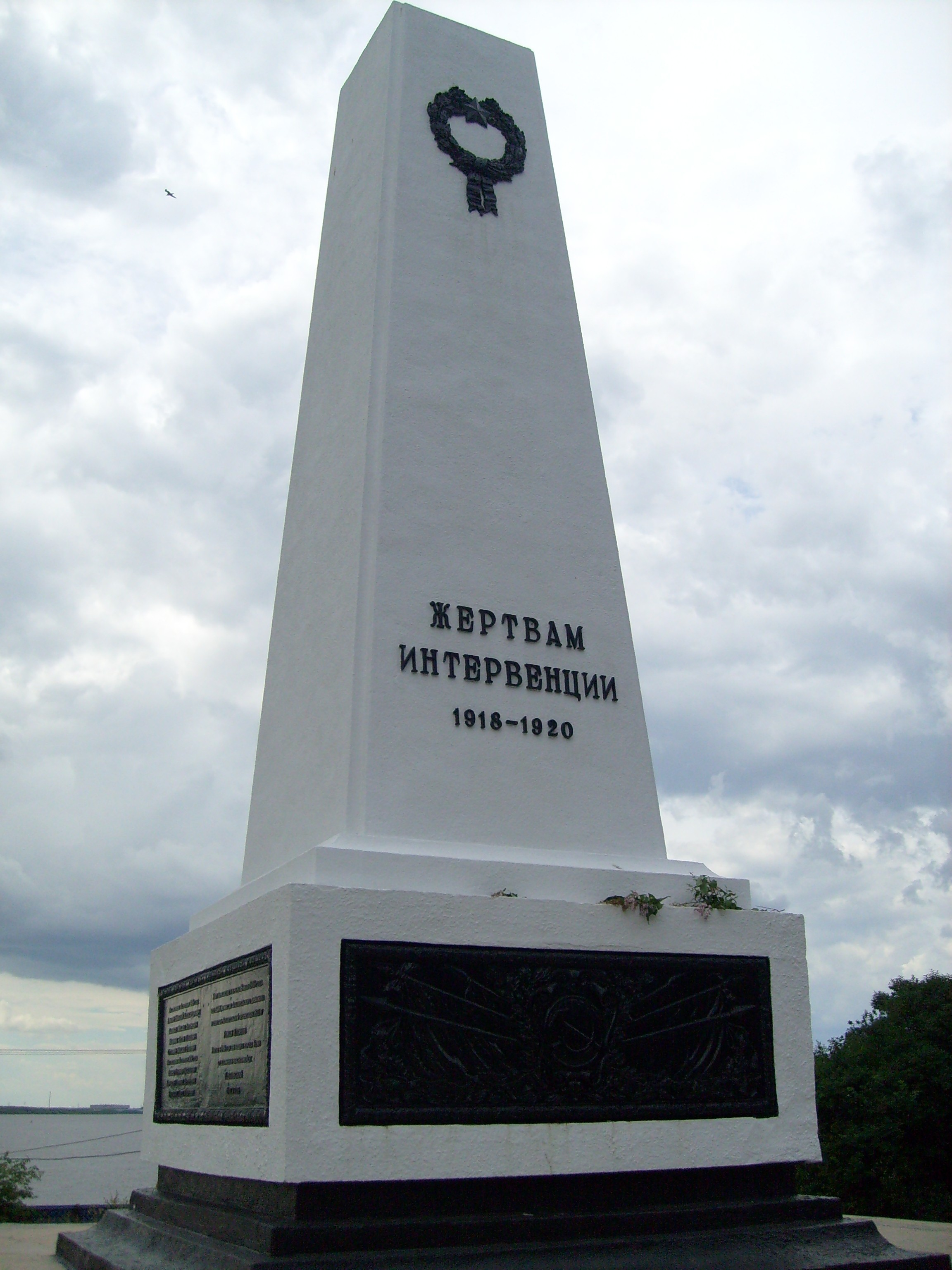 Монумент жертвам интервенции 1918-1920, Набережная Северной Двины, Архангельск